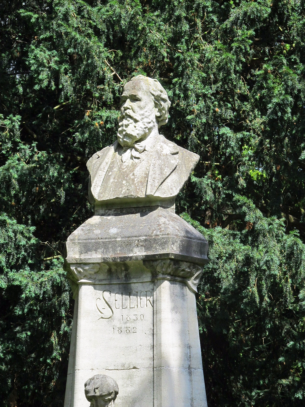 Monument à Charles Sellier - Nancy, parc de la Pépinière. Sculpteur: Alfred Finot